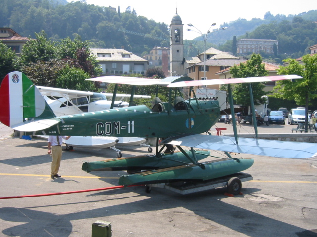 Aerodrome de Côme - Lac de Côme - Italie